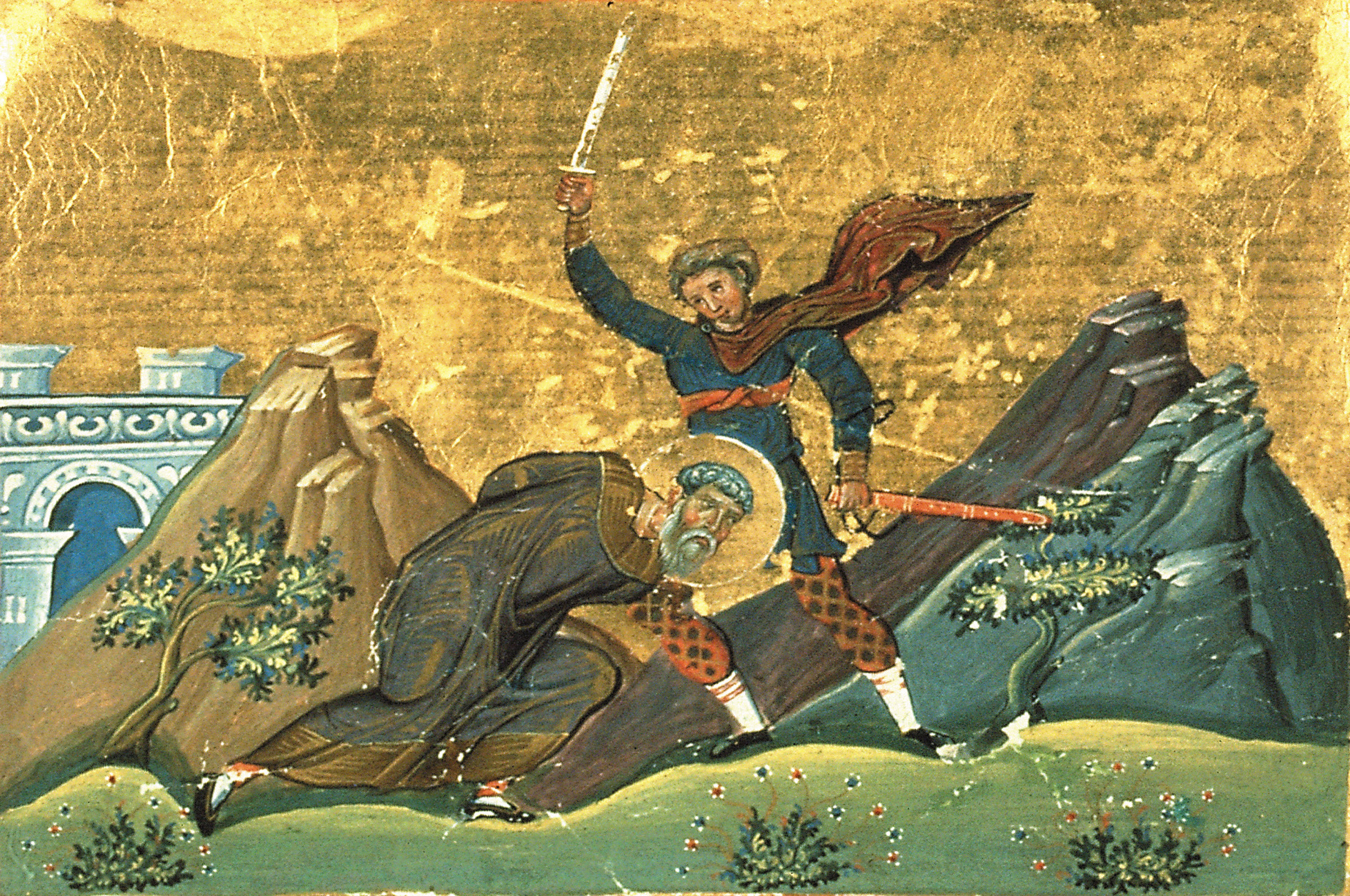 Полиевкт Мелитинский, мч. Константинополь. 985 г. Миниатюра Минология Василия II. Ватиканская библиотека. Рим.